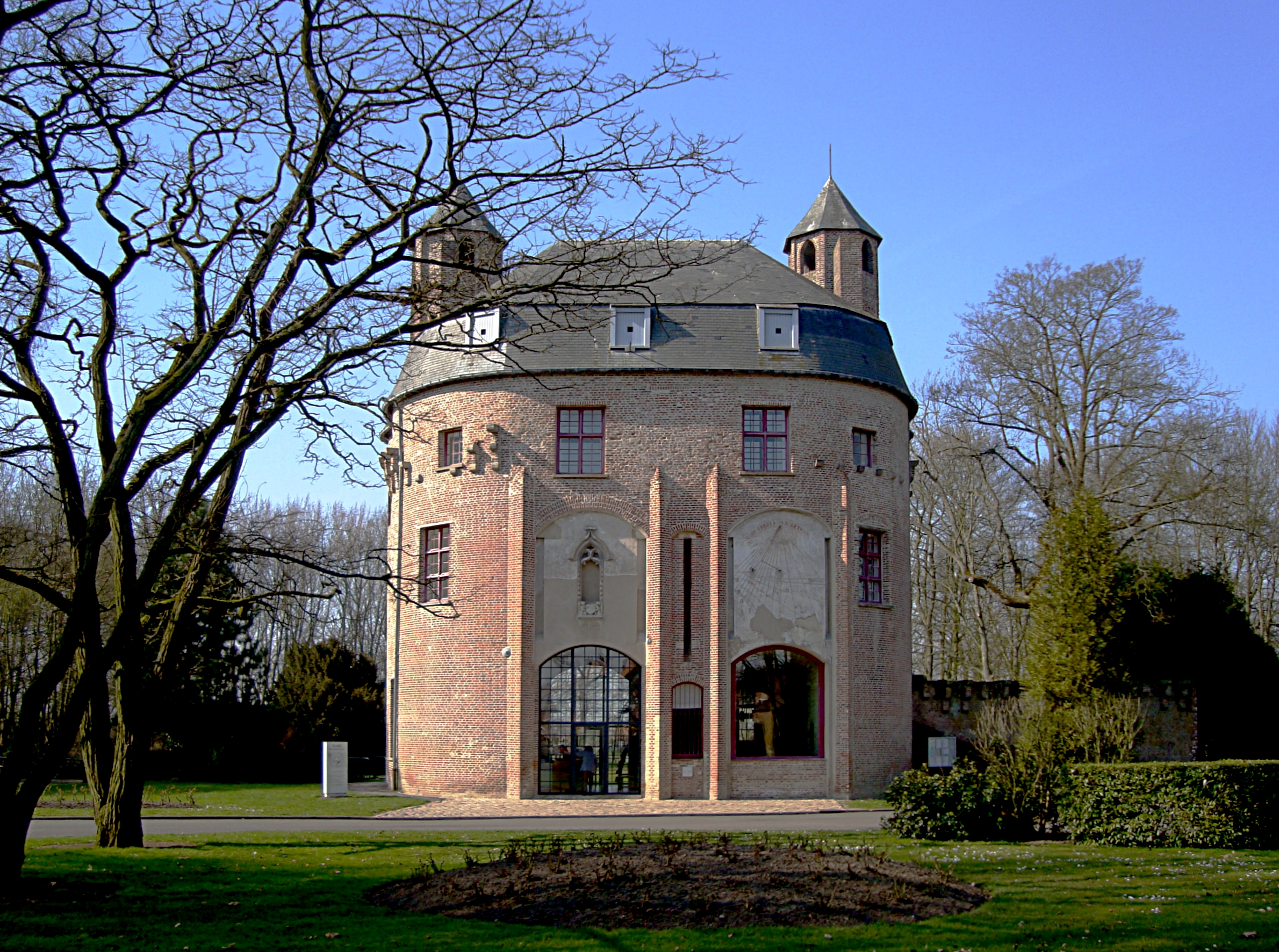 Le donjon du château de Commynes à Renescure (Pas-de-Calais), aujourd'hui occupé par la mairie.